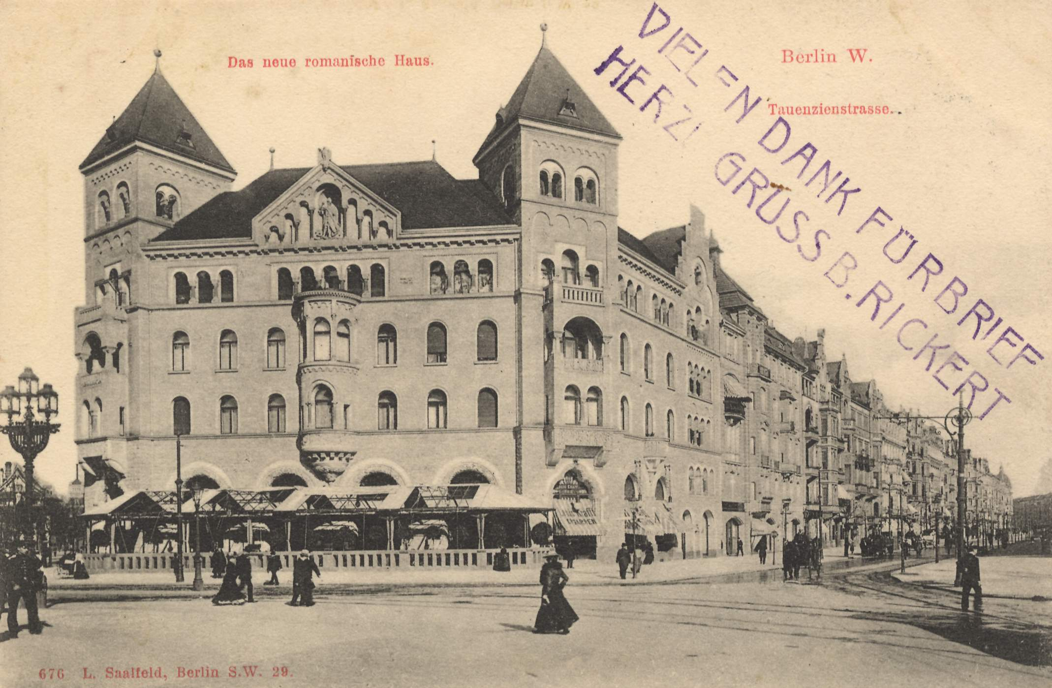 Zweites Romanisches Haus, Kurfürstendamm 238 (heute Budapester Straße 43), und Blick in die Tauentzienstraße in Berlin-Charlottenburg